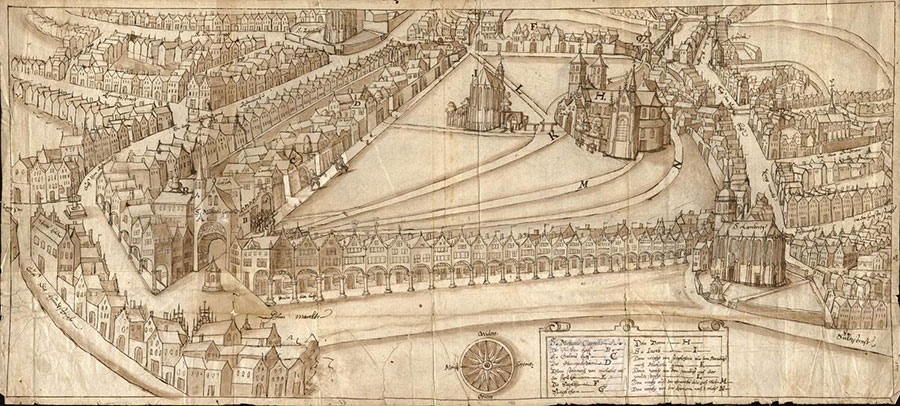 Stadtplan von Münster, erstes Jahrzehnt des 17. Jahrhunderts